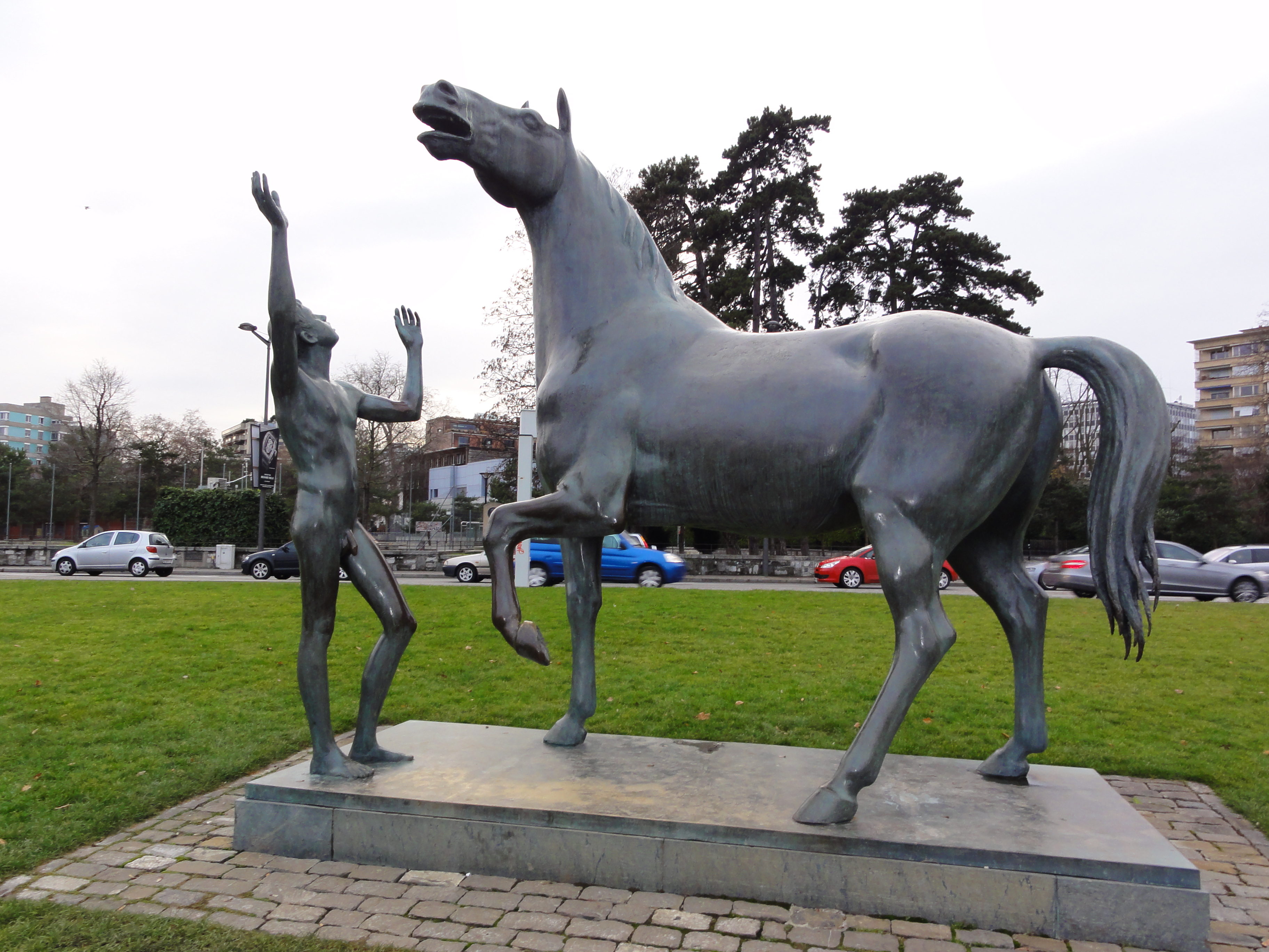 Sculpture du suisse Heinz Schwartz Quai Wilson Rade de Genève